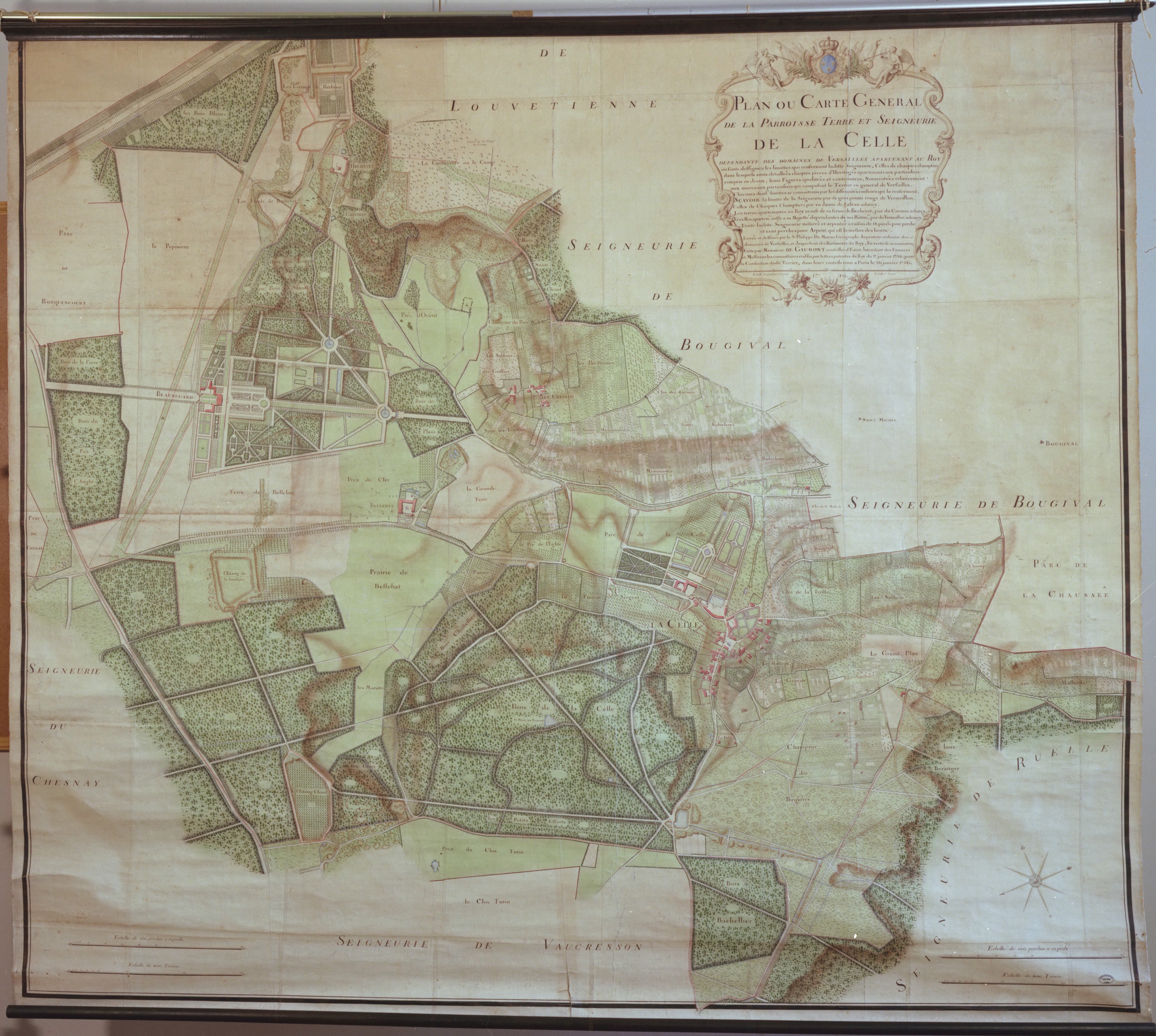 Plan ou carte générale de la paroisse, terre et seigneurie de la Celle (La Celle-Saint-Cloud), dépendant du domaine de Versailles, appartenant au roi, levé et dessiné par le sieur Philippe de Marne, géographe-arpenteur des domaines de Versailles, 1739.